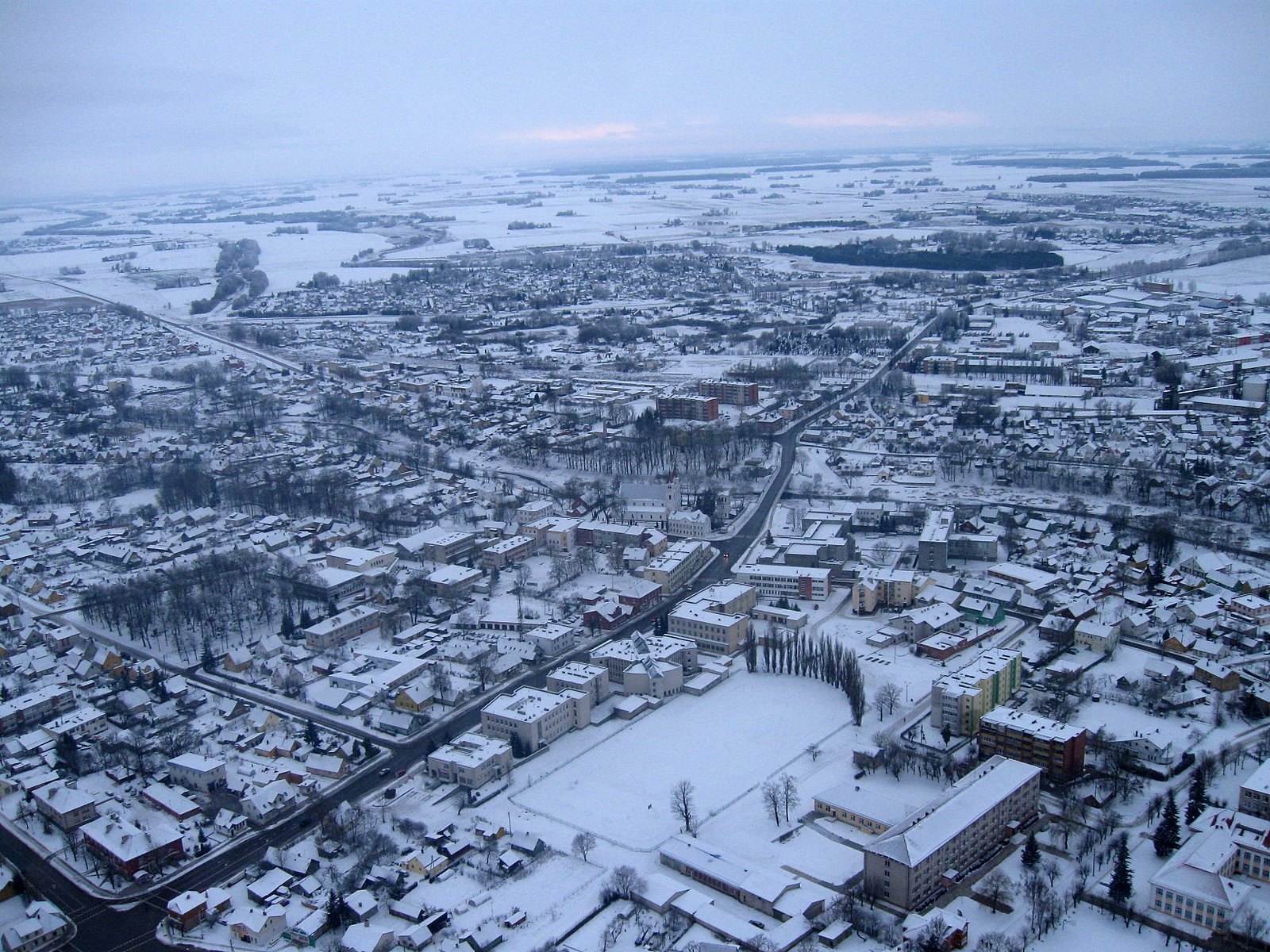 Город Пасвалис зимой.